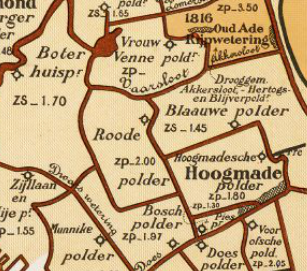 Rode Polder